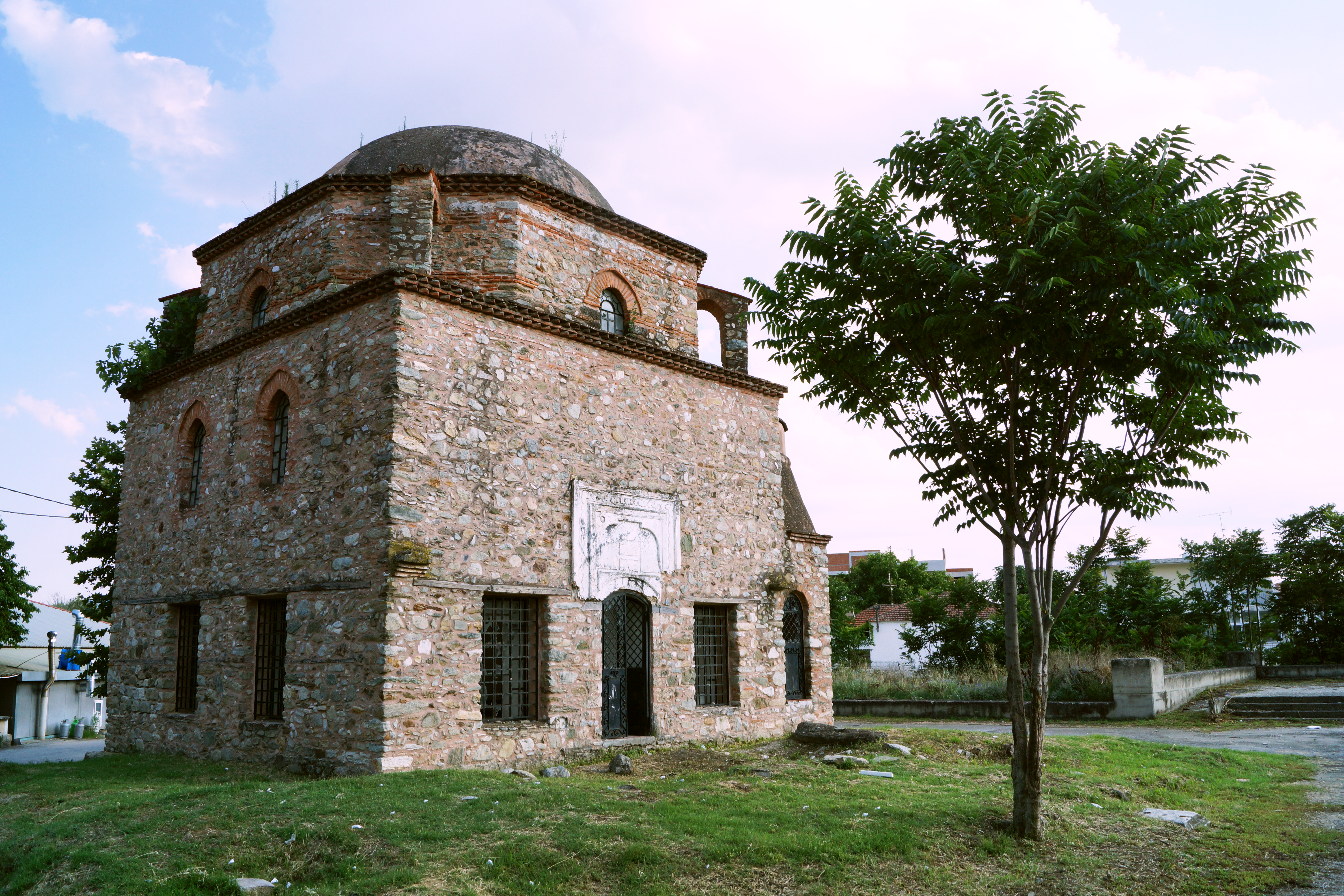 Τζαμί Ελασσόνας«Τζαμί Ελασσόνας»